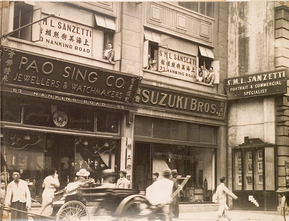 沈石蒂照相館(二樓)，當時位於上海市南京路73號